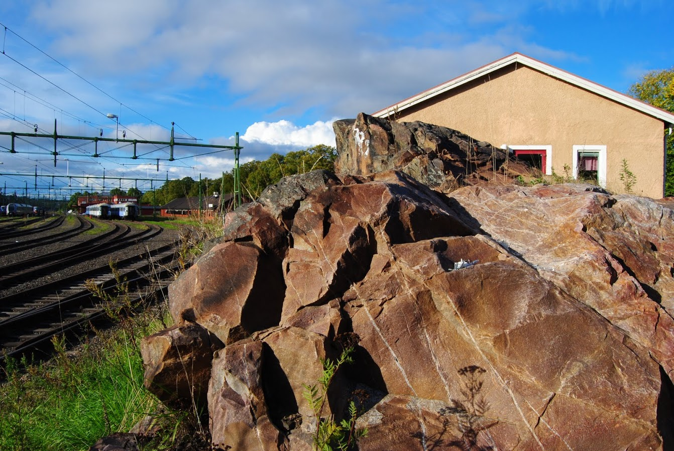 Vid järnvägen, strax under Staffansbron kan man se hur den röda gävlesandstenen går i dagen som en del av det stråk som löper under jord.